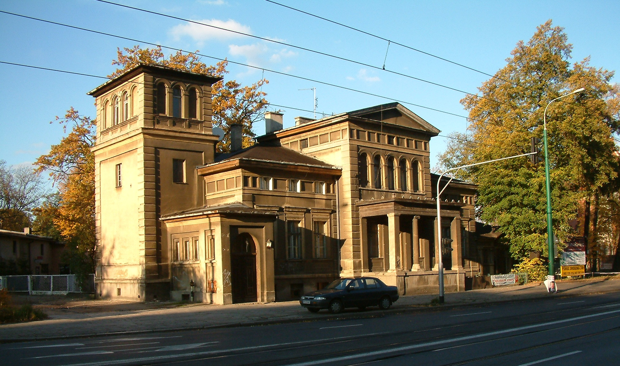 Poznań, ul. Grunwaldzka 3 - Villa Nova ("Willa Flora")